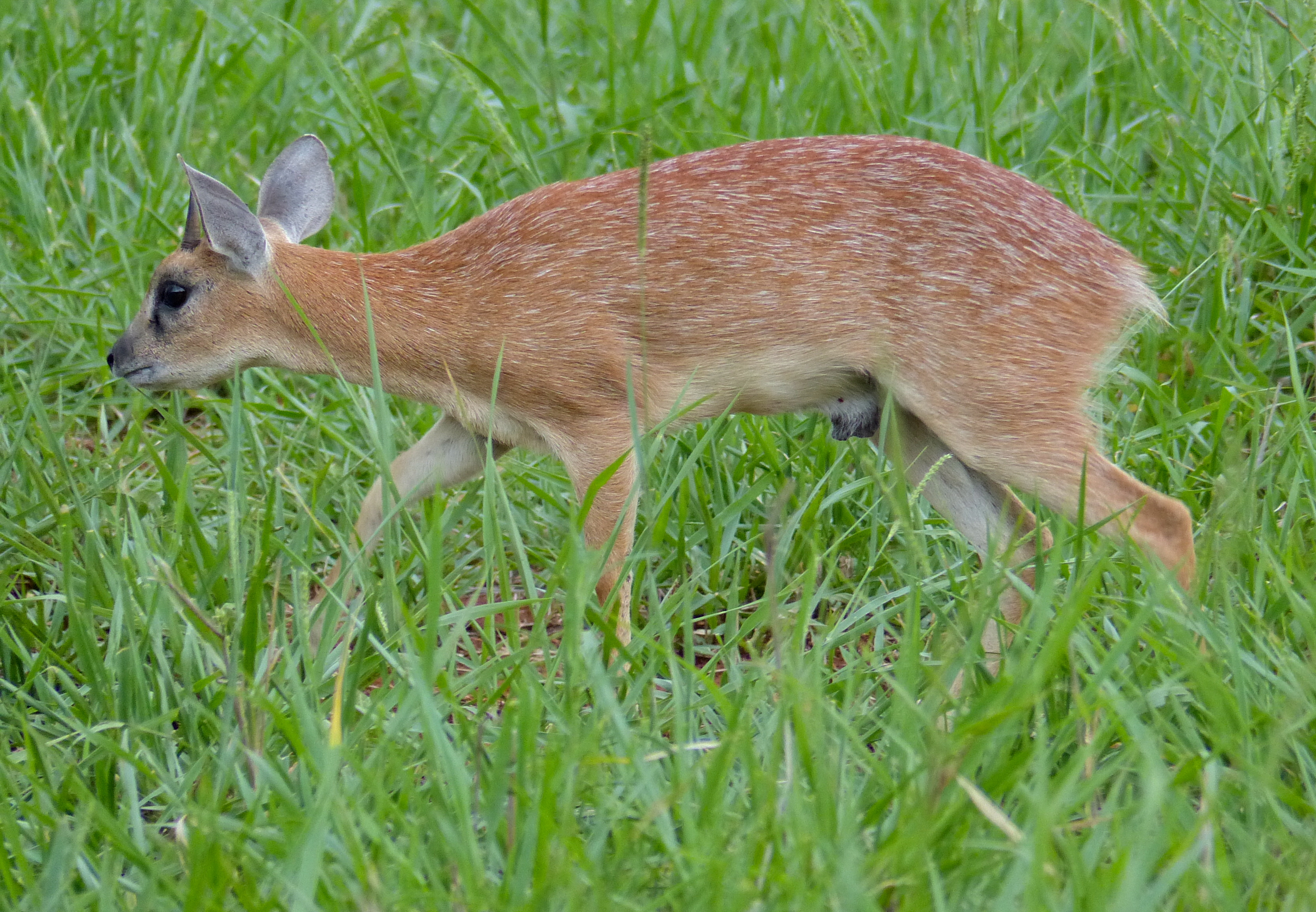 Mahonie Loop near Punda Maria, Kruger NP, SOUTH AFRICA